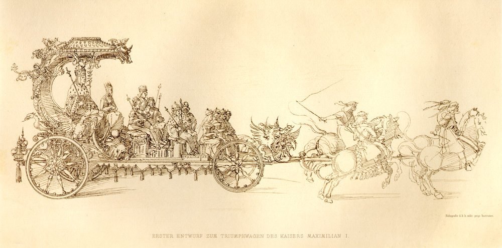 Triumphwagen für Kaiser Maximilian I. (Skizze)